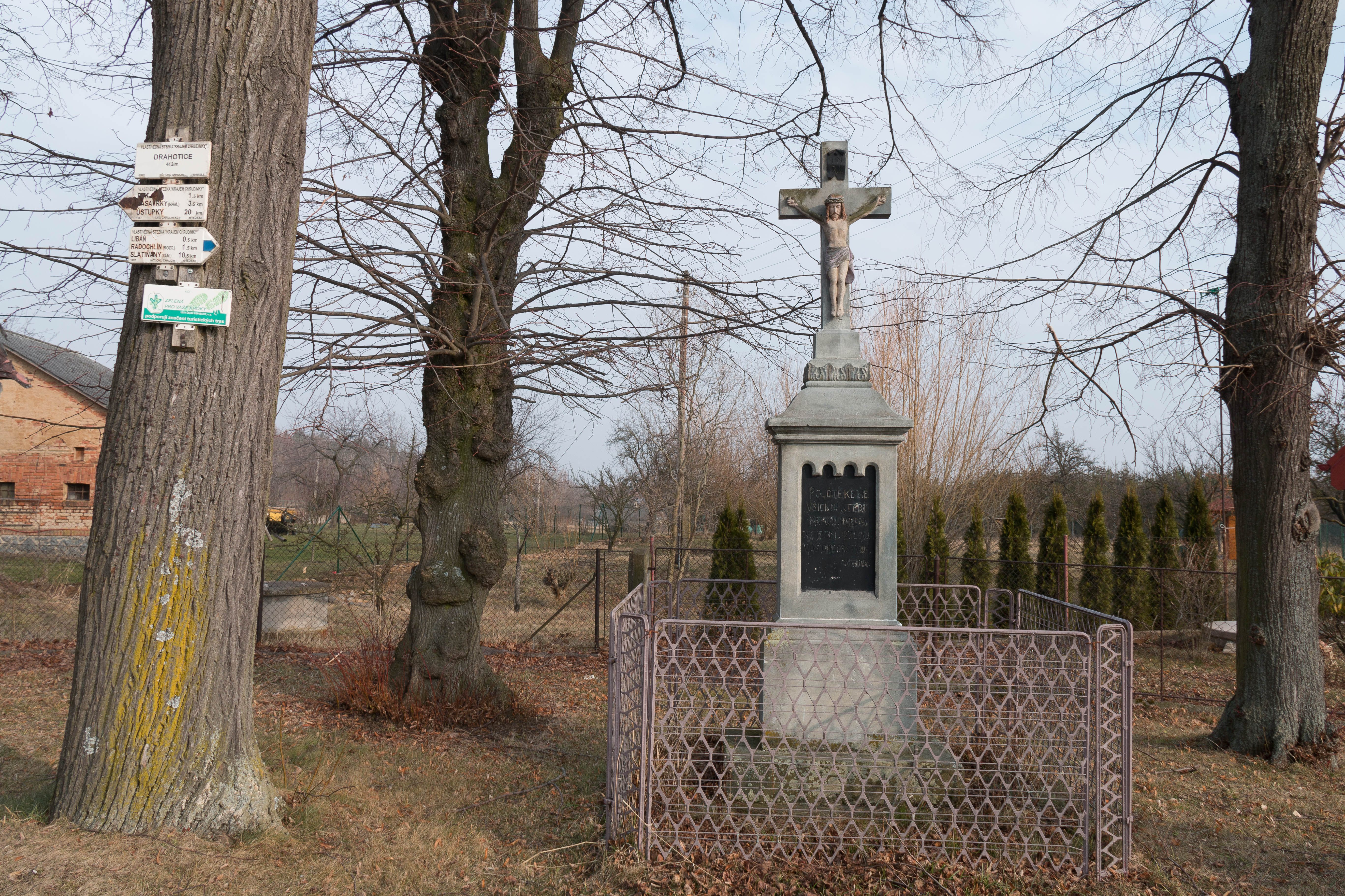 Drahotice kříž